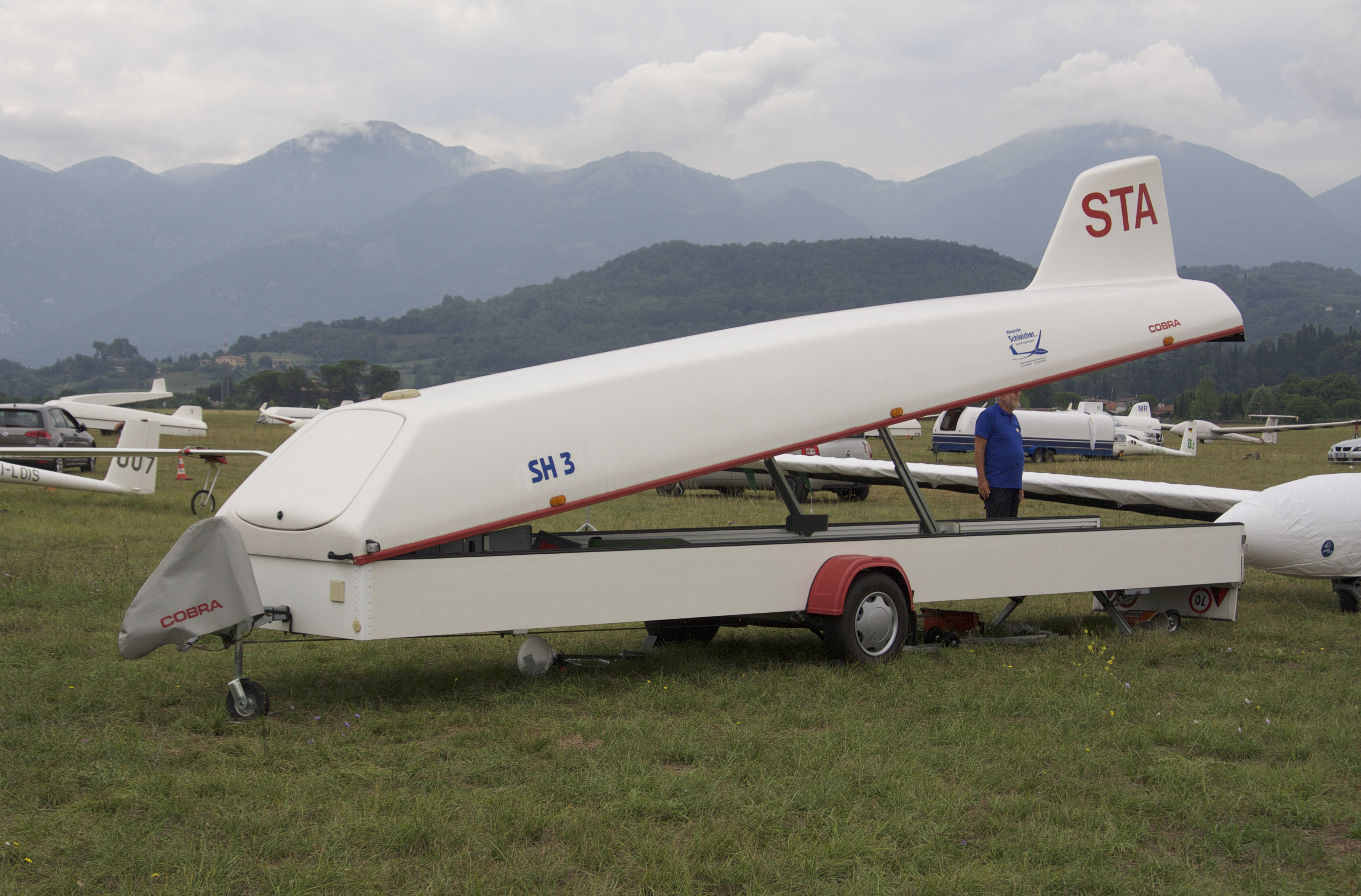 Carrello di trasporto per aliante